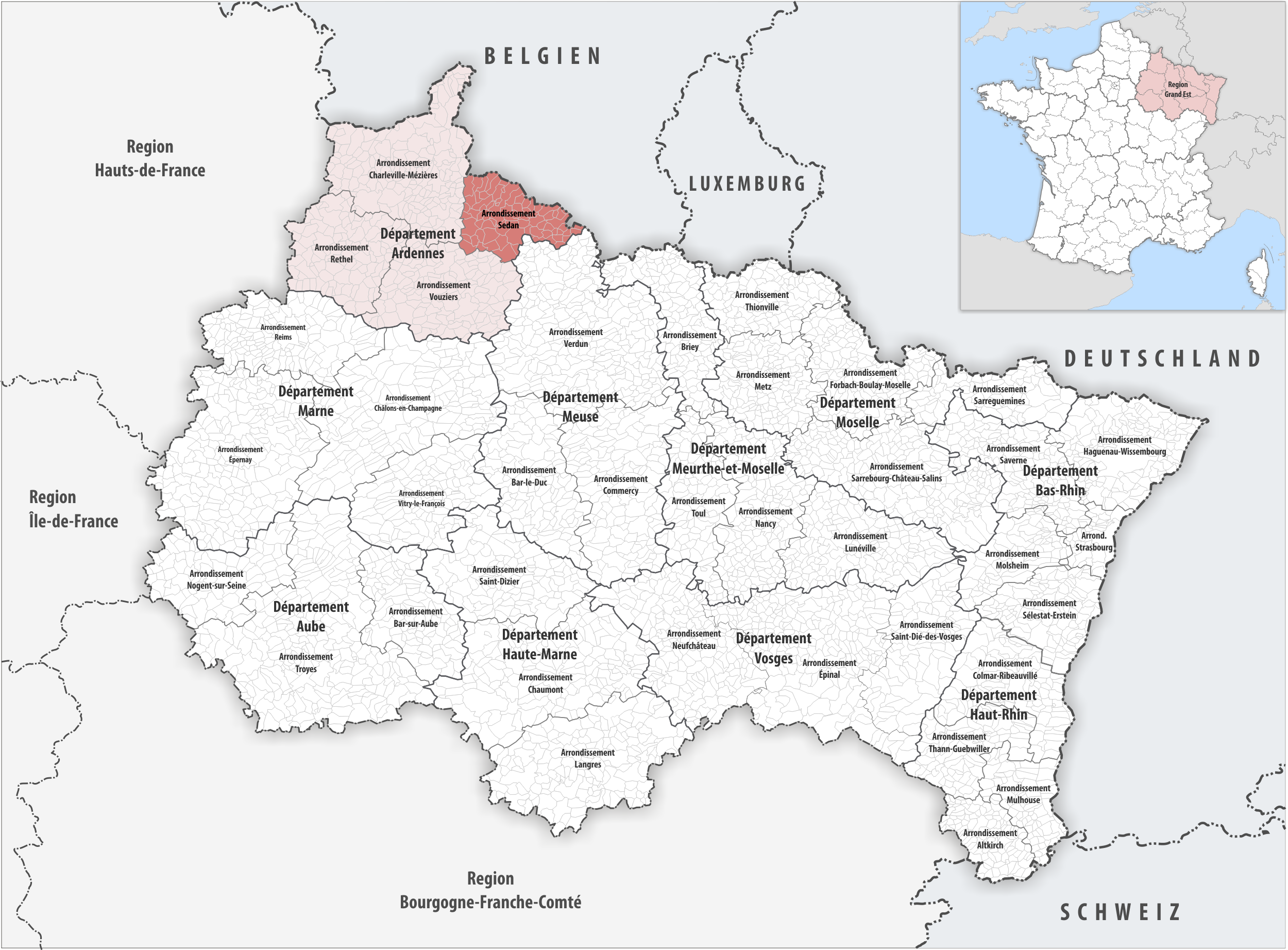 Lage des Arrondissements Sedan